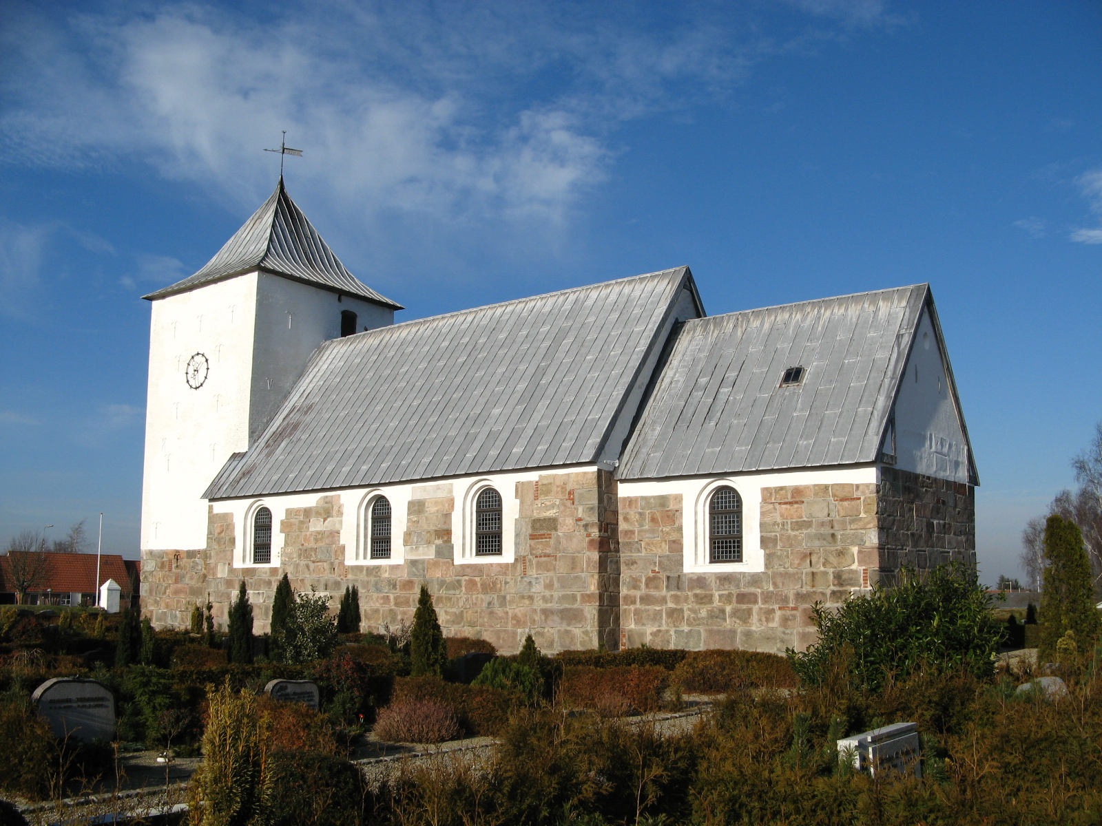 Næsbjerg Kirke, Næsbjerg sogn, Varde kommune (former: Skads Herred, Ribe Amt). Kirken set fra sydøst.